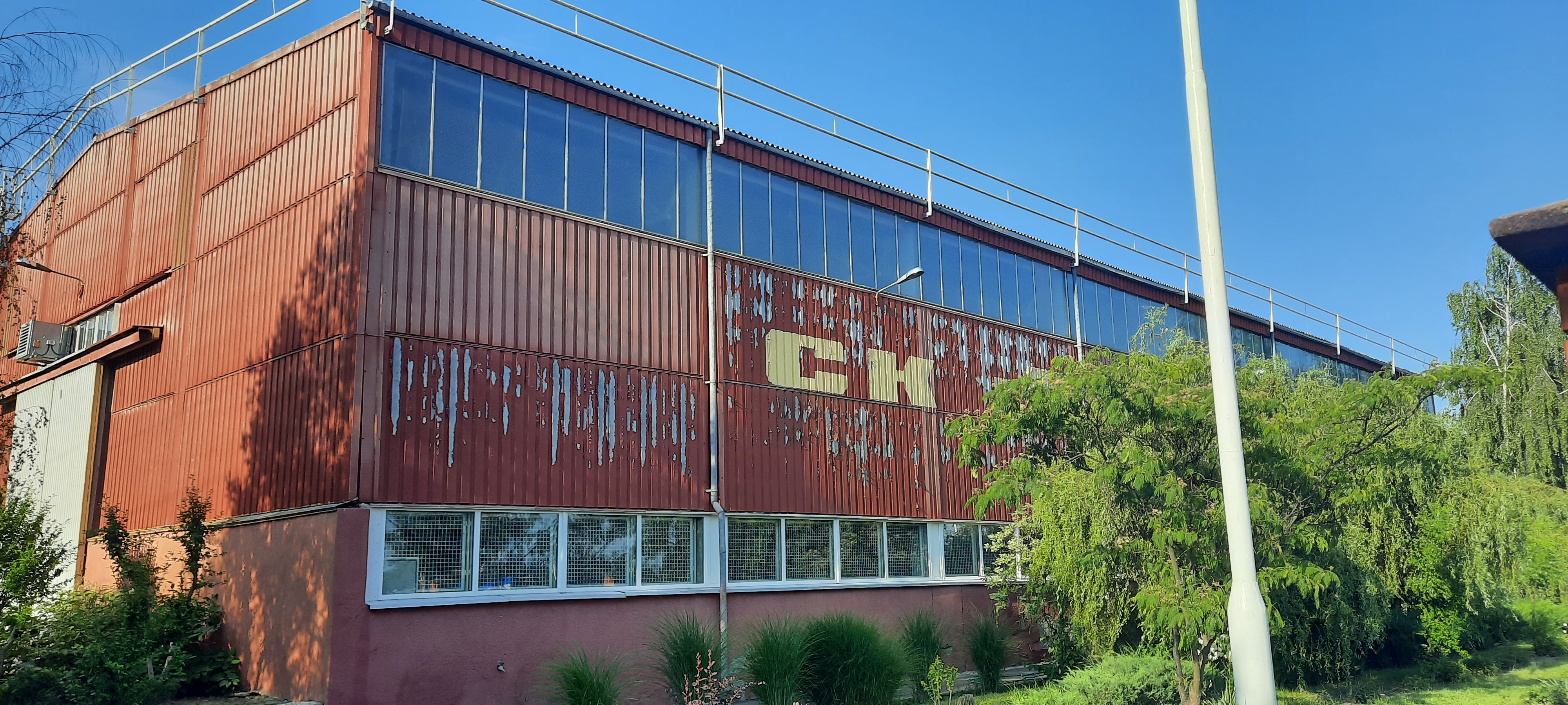 Здание спортивного косплекса "Портовик" со стороны улицы Портовой по состоянию на 26 июня 2020 года